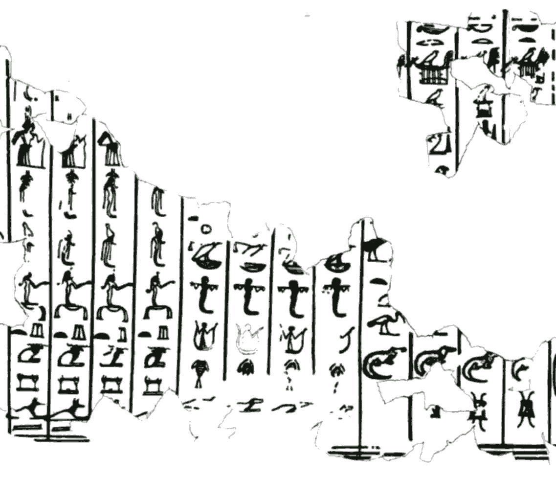 detail from the giza writing board/detail aus der schreibtafel des mesdjeru aus Gizeh